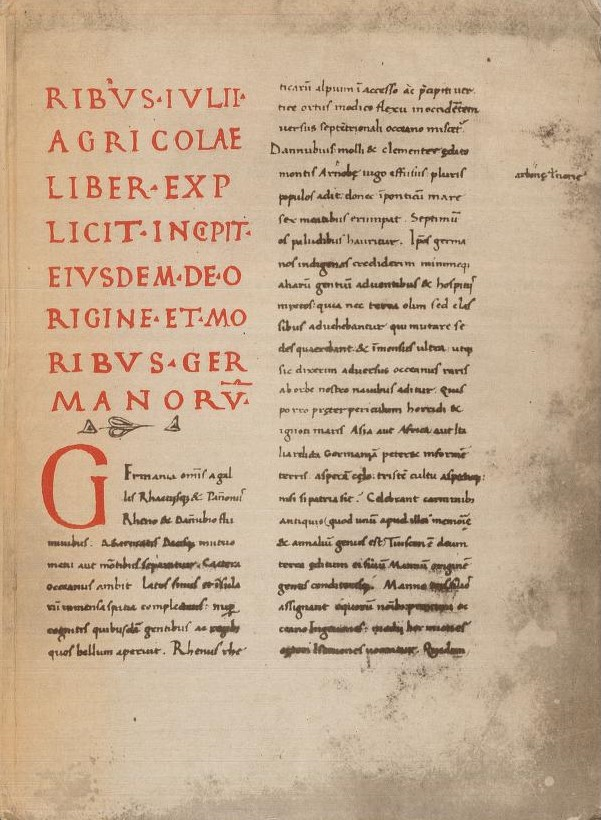 Faksimile des Incipt der Germania des Tacitus des Codex Aesinas Latinus 8 = Codex Vittorio Emanuele 1631